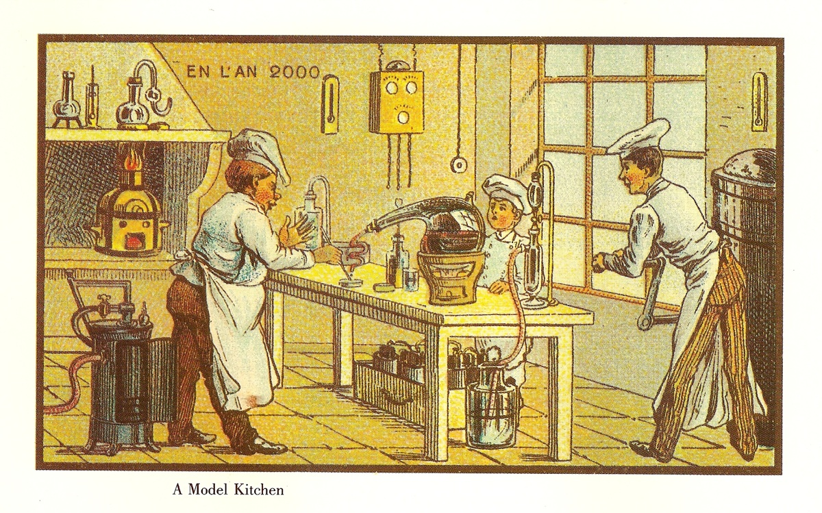 paper card